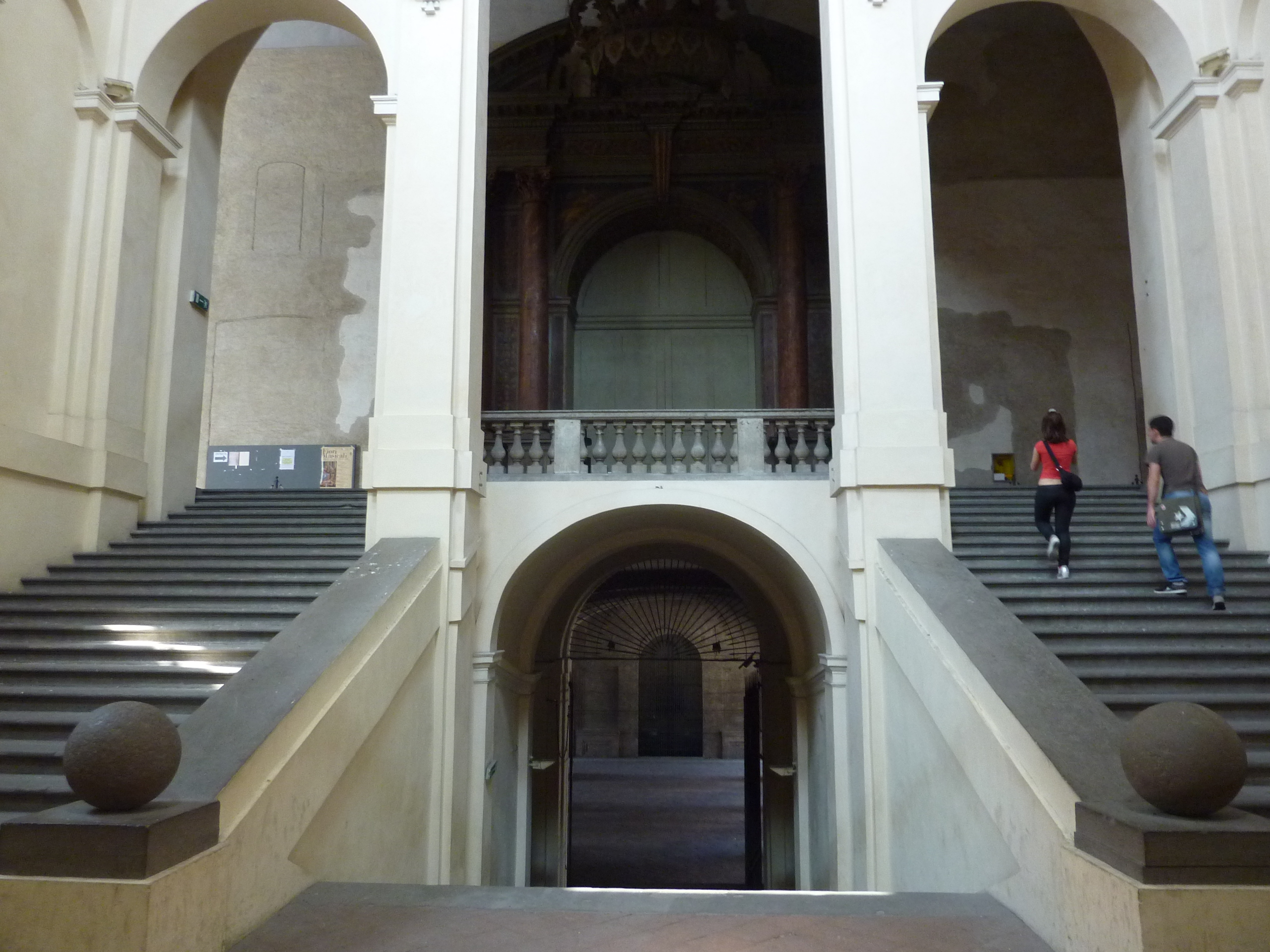 Lo scalone del palazzo della Pilotta che porta alla Galleria Nazionale, alla Biblioteca Palatina e al teatro Farnese (Parma).